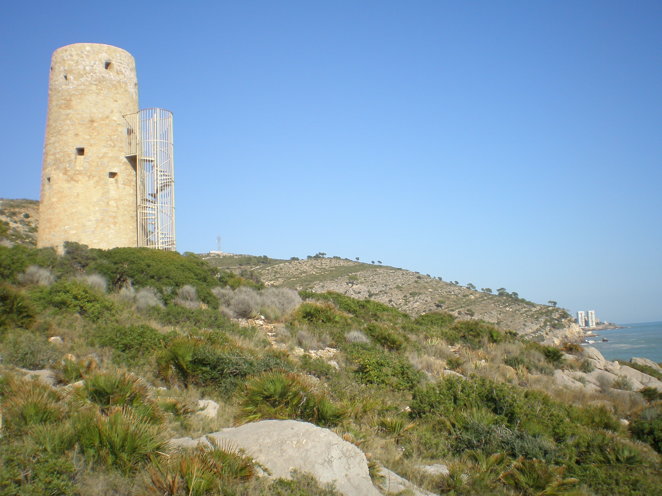 Oropesa del Mar